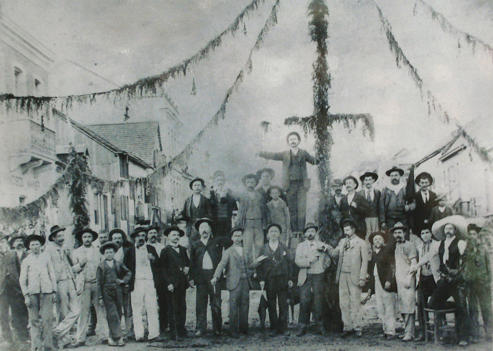 Festa de Ano Novo 1899-1900 em Caxias do Sul